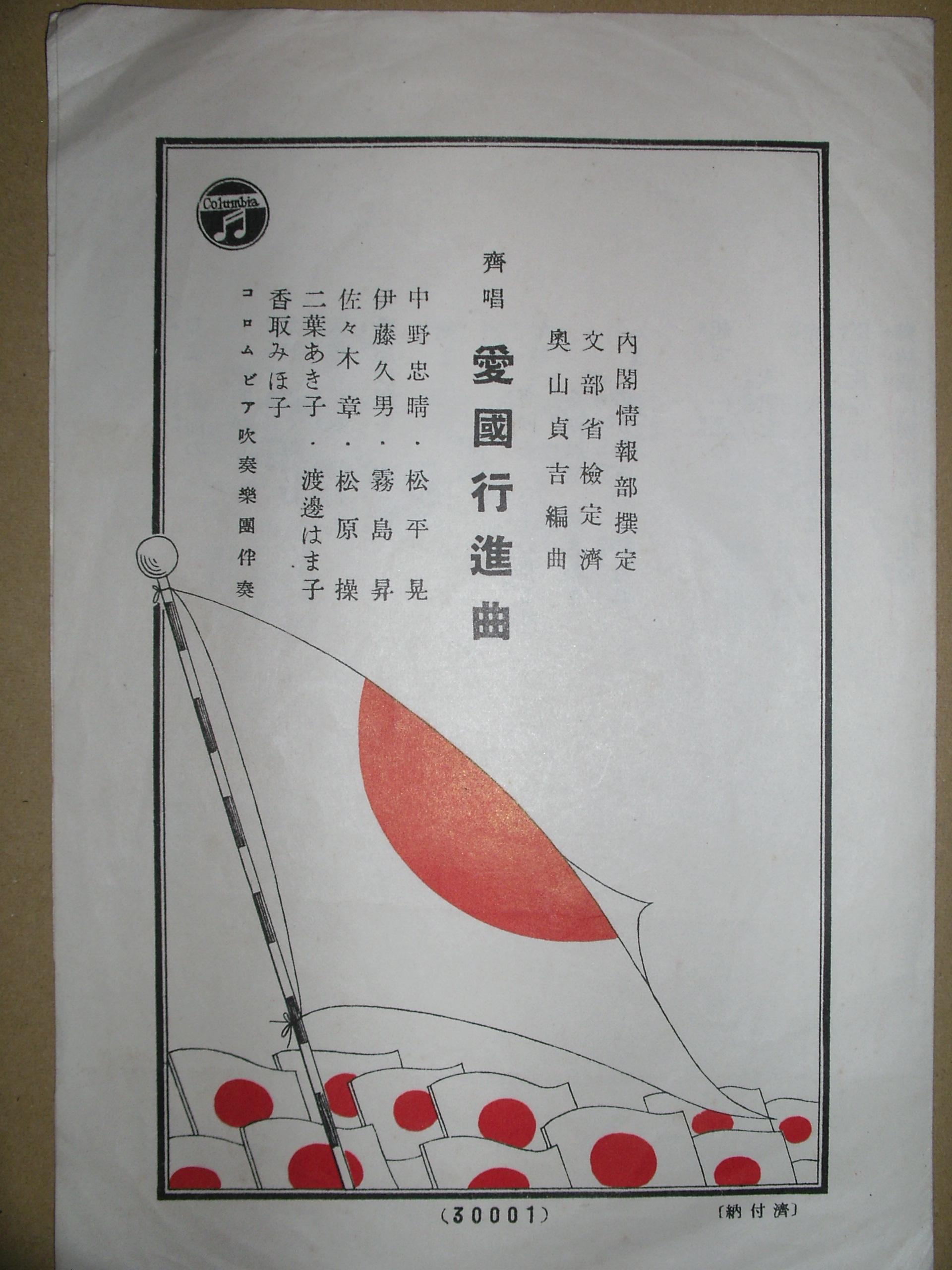 1938年コロムビアレコード発売の愛国行進曲の歌詞を撮影